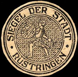 Sealing stamp Title: Siegel der Stadt - Rüstringen Description: weiß, schwarz Place: Rüstringen size: 3 cm